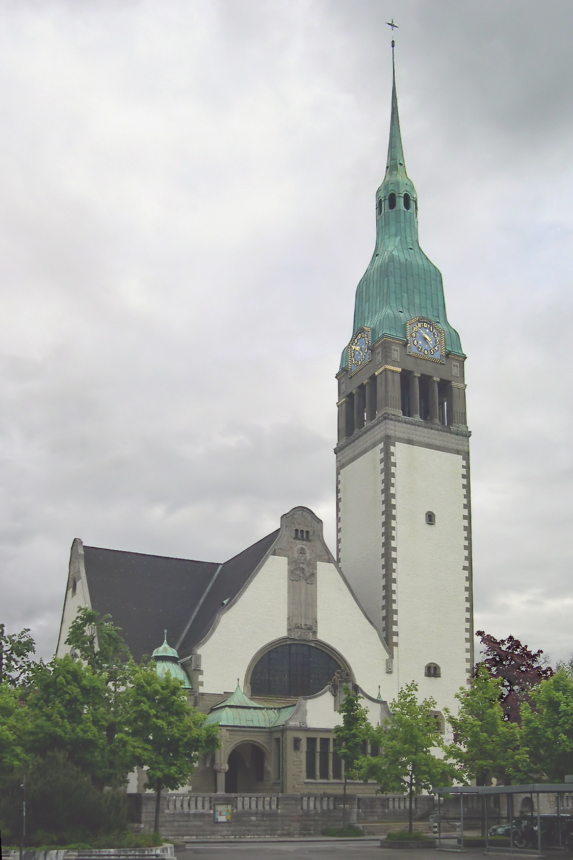 Die Pauluskirche in Bern.